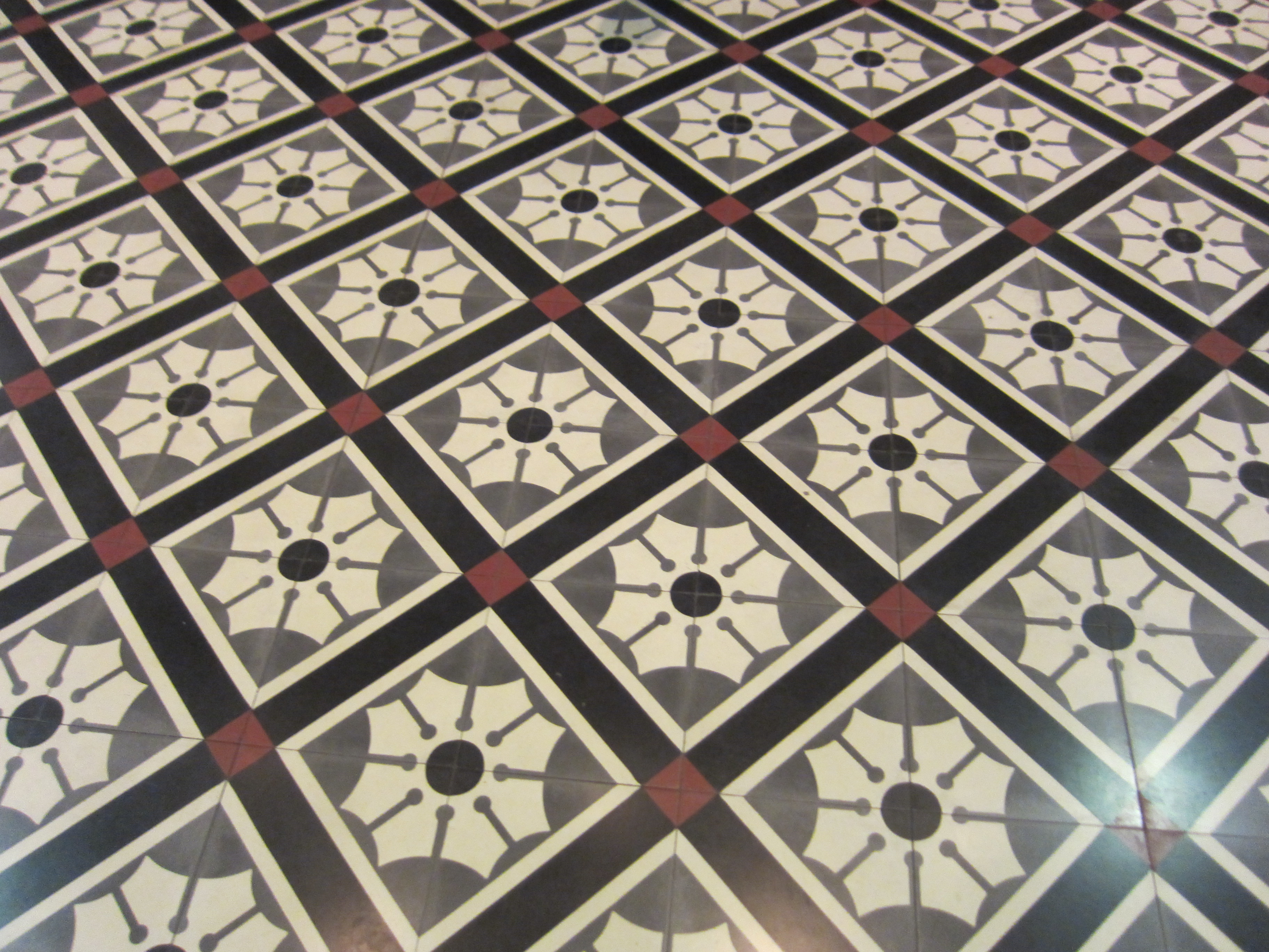 הרצלילינבלום - מוזיאון לבנקאות ונוסטלגיה תל אביבית הוא מוזיאון להיסטורית הבנקאות בתל אביב ובארץ ישראל. המוזיאון הוקם בתל אביב על ידי בנק דיסקונט. המוזיאון הוקם ב"בית שיף" בקרן הרחובות הרצל ולילינבלום. הקומה הראשונה של הבית נבנתה בשנת 1909 כבית מגורים פרטי של משפחת פרנק, בחלקה שבה זכתה בהגרלת המגרשים לאחוזת בית. לאחר מכן נמכר הבית למשפחת שיף ובשנת 1924 נוספו לו שתי קומות.